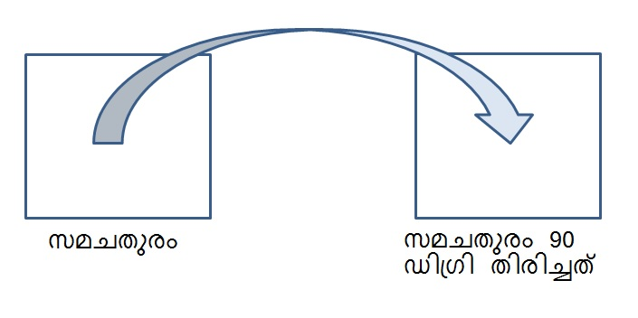 സമചതുരം 90 ഡിഗ്രി തിരിച്ചത്